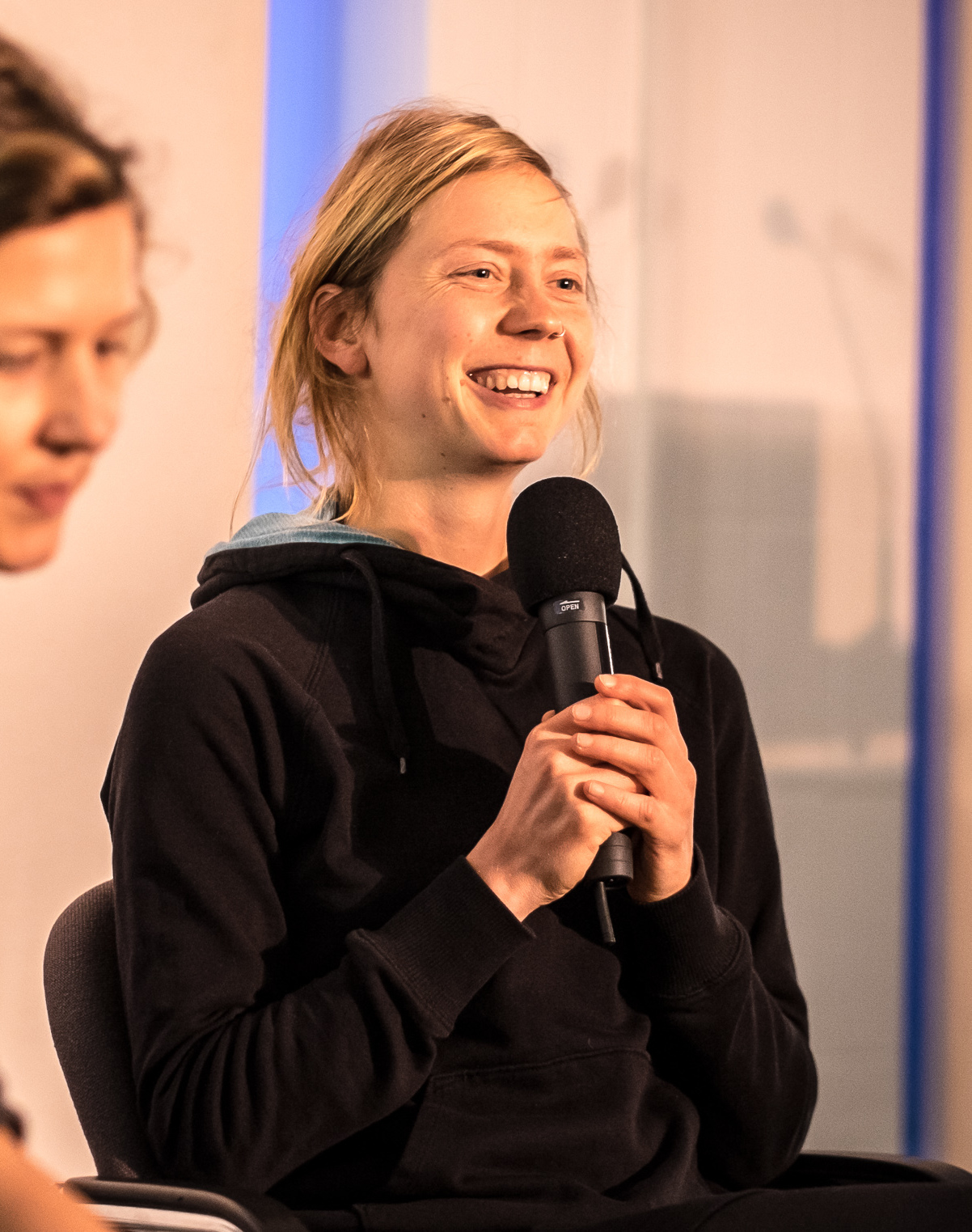 "Bitcoin Meets Blue Marble" Public Talk with Luise Neumann-Cosel (buerger-energie-berlin.de) Moderation: Ela Kagel (Berlin)